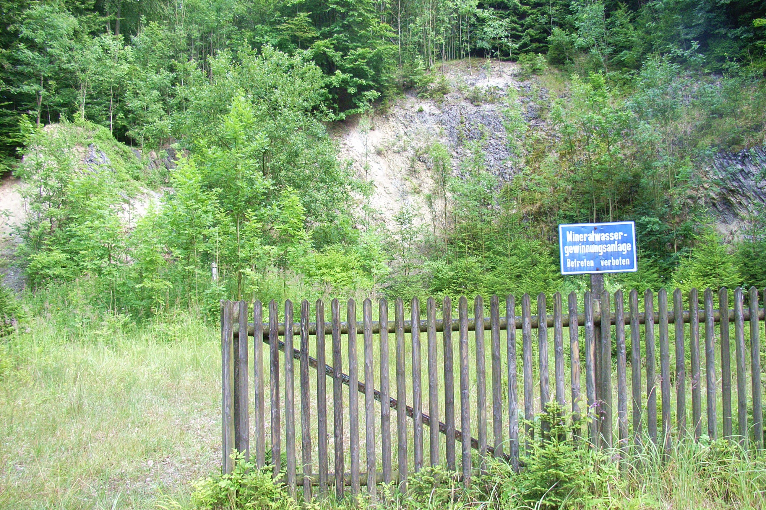 Die Mineralquelle I liegt im Tal zwischen Kohlberg und Düsenberg in einem aufelassenen Steinbruch bei Bad Driburg.